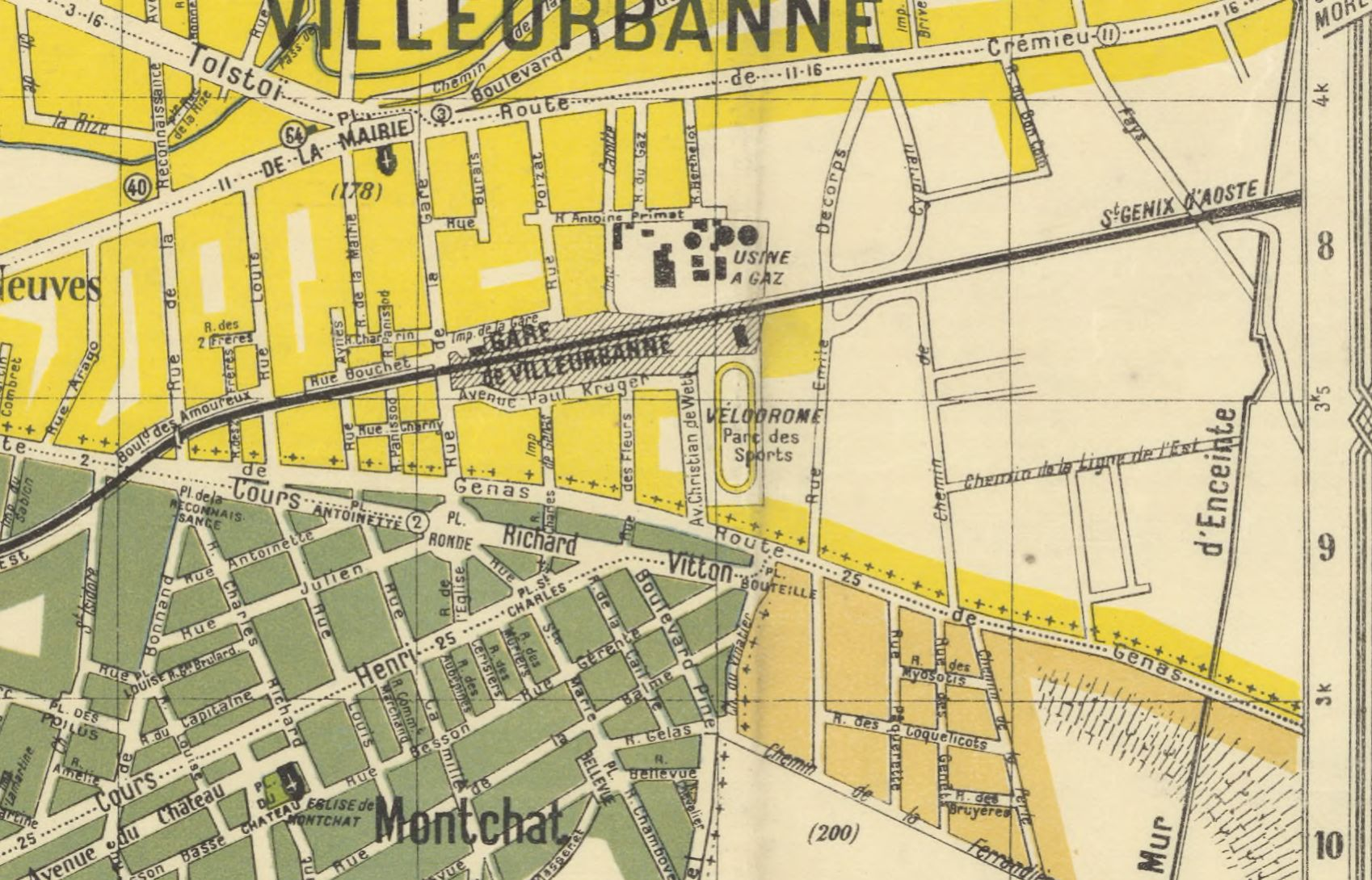 Auteur : Édouard Fonné DescriptionFrench cartographerAuthority control : Q50315556 VIAF: 37217981 ISNI: 0000 0000 2291 5288 LCCN: n81098923 BNF: 15321338j WorldCat , cartographe. Vieux plan de Lyon